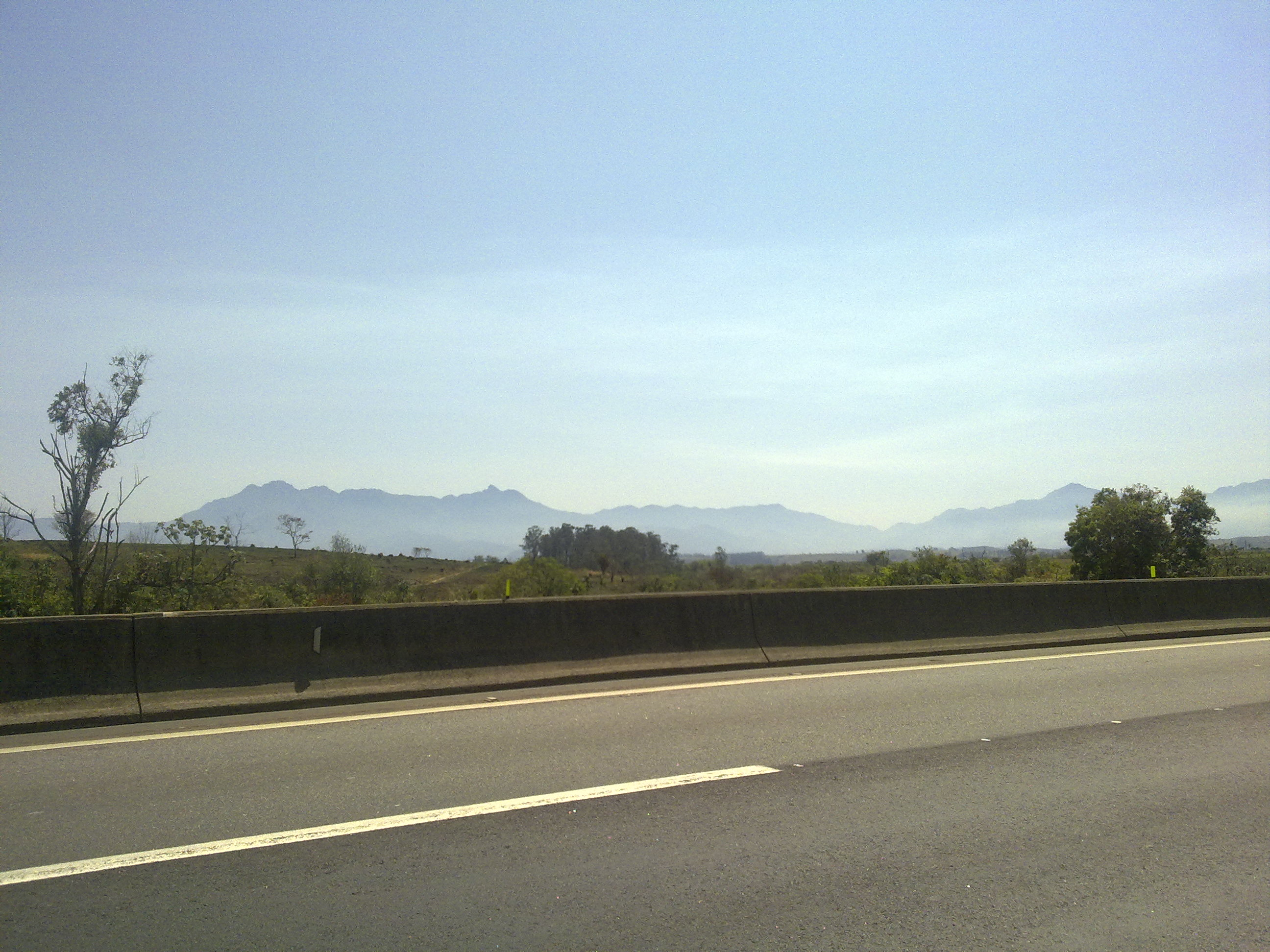 O ponto mais baixo ainda hoje é usado para travessia da Serra da Mantiqueira